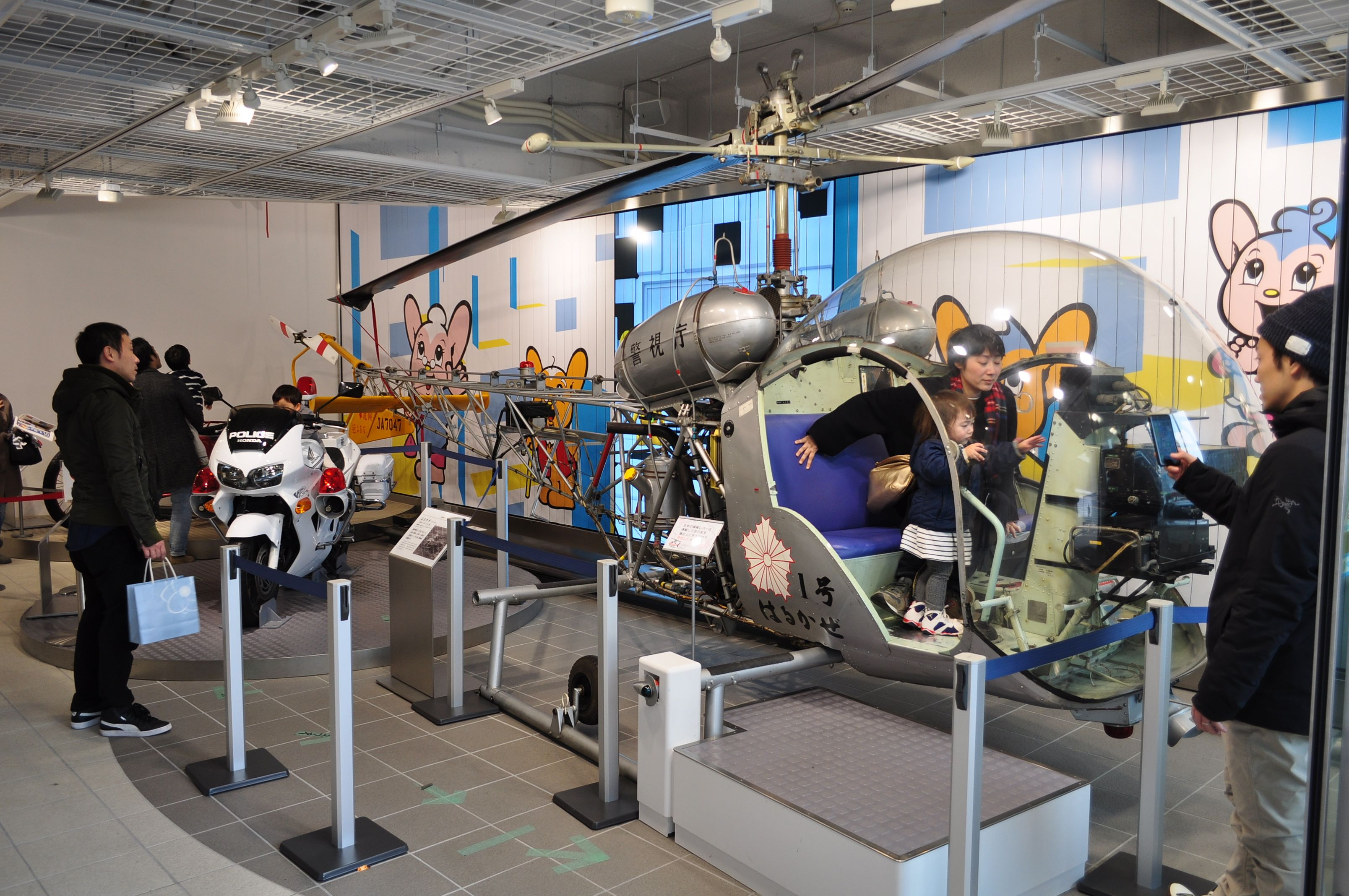 警察博物館 Nikon D5000